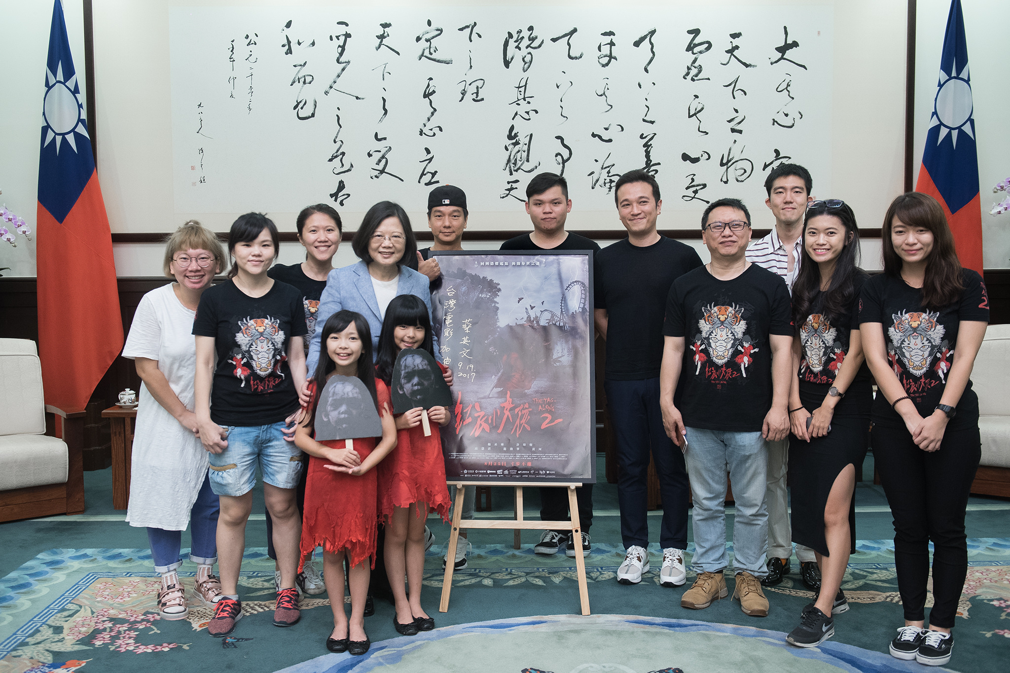 09.19 總統接見電影「紅衣小女孩」製作團隊